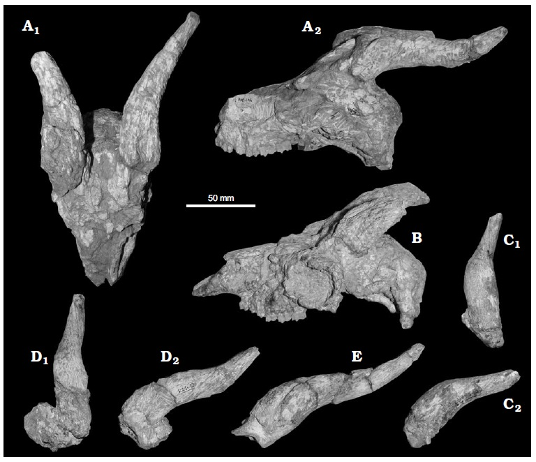 Oiocerin antelope Samotragus from Northern Greece. A, B, E. Samotragus praecursor Bouvrain and Bonis, 1985 from Ravin de la Pluie (RPl), Axios Valley, late Vallesian (Late Miocene). A. LGPUT RPl−105n, cranium in dorsal (A1) and lateral (A2) views. B. LGPUT RPl−480, holotype cranium in lateral view. E. LGPUT RPl−37, left horncore in lateral view. C, D. Samotragus cf. praecursor Bouvrain and Bonis, 1985 from Ravin des Zouaves 1 (RZ1), Axios Valley, late Vallesian (Late Miocene). C. LGPUT RZ1−11, left horncore in anterior (C1) and lateral (C2) views. D. LGPUT RZ1−17 left horncore in anterior (D1) and lateral (D2) views.